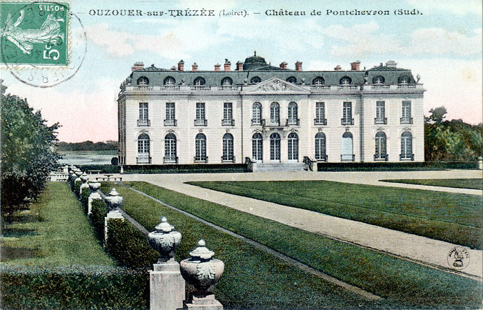 Château de Pontchevron, Ouzouer-sur-Trézée, Loiret, France